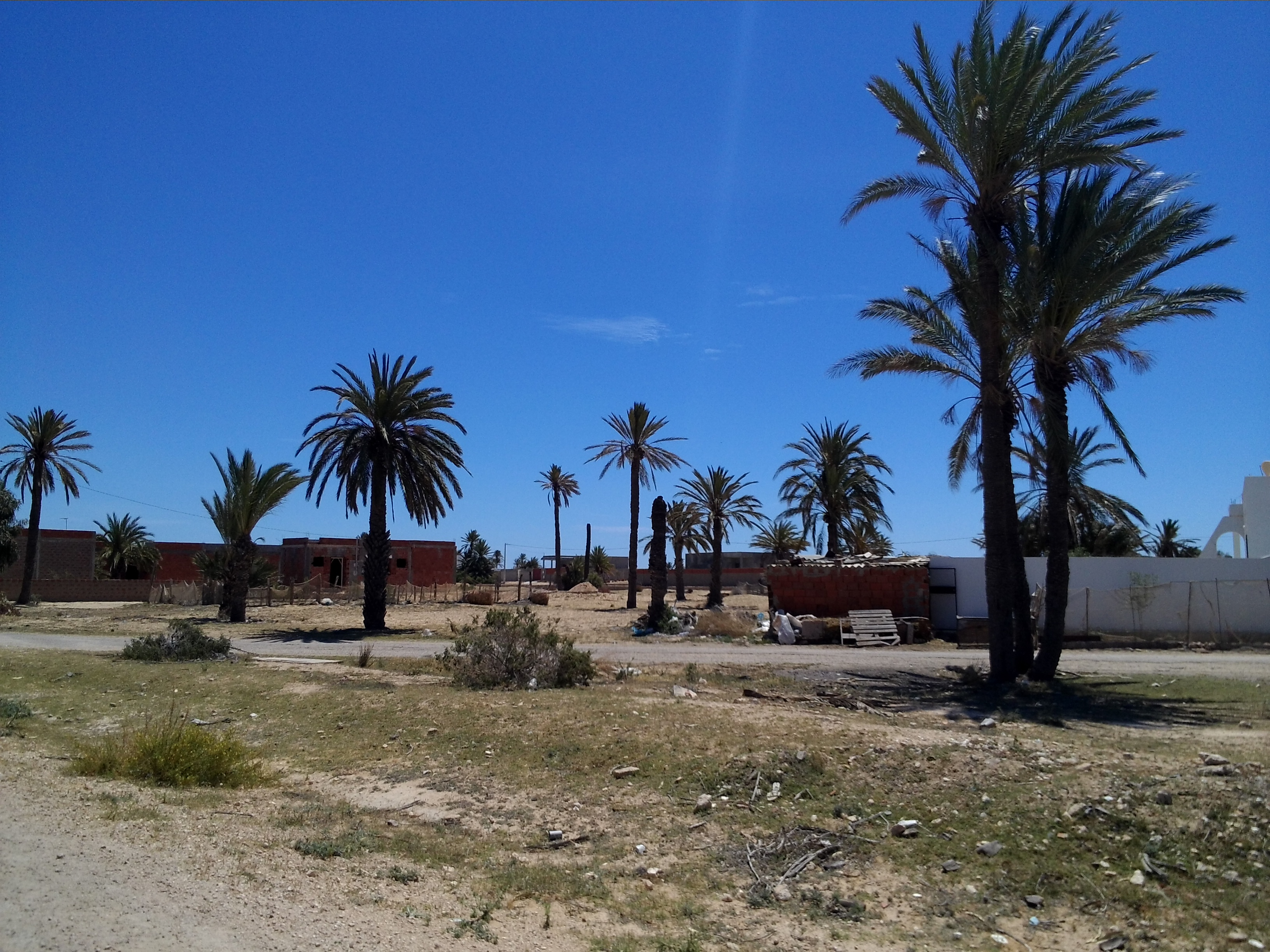 На острові Шергі